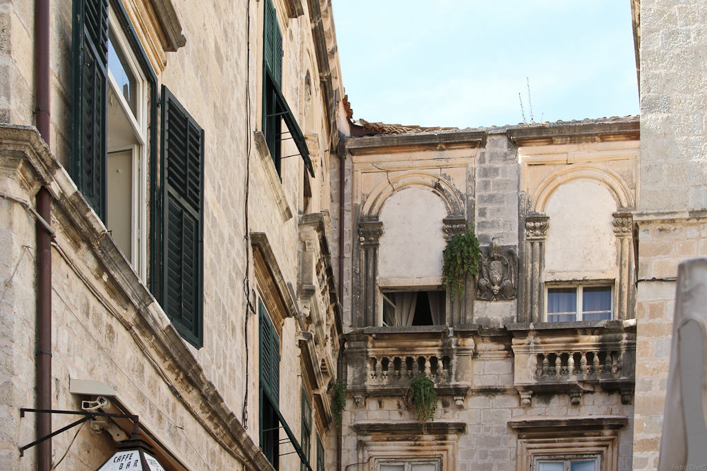 Villa de Bona (Bunić) in Dubrovnik